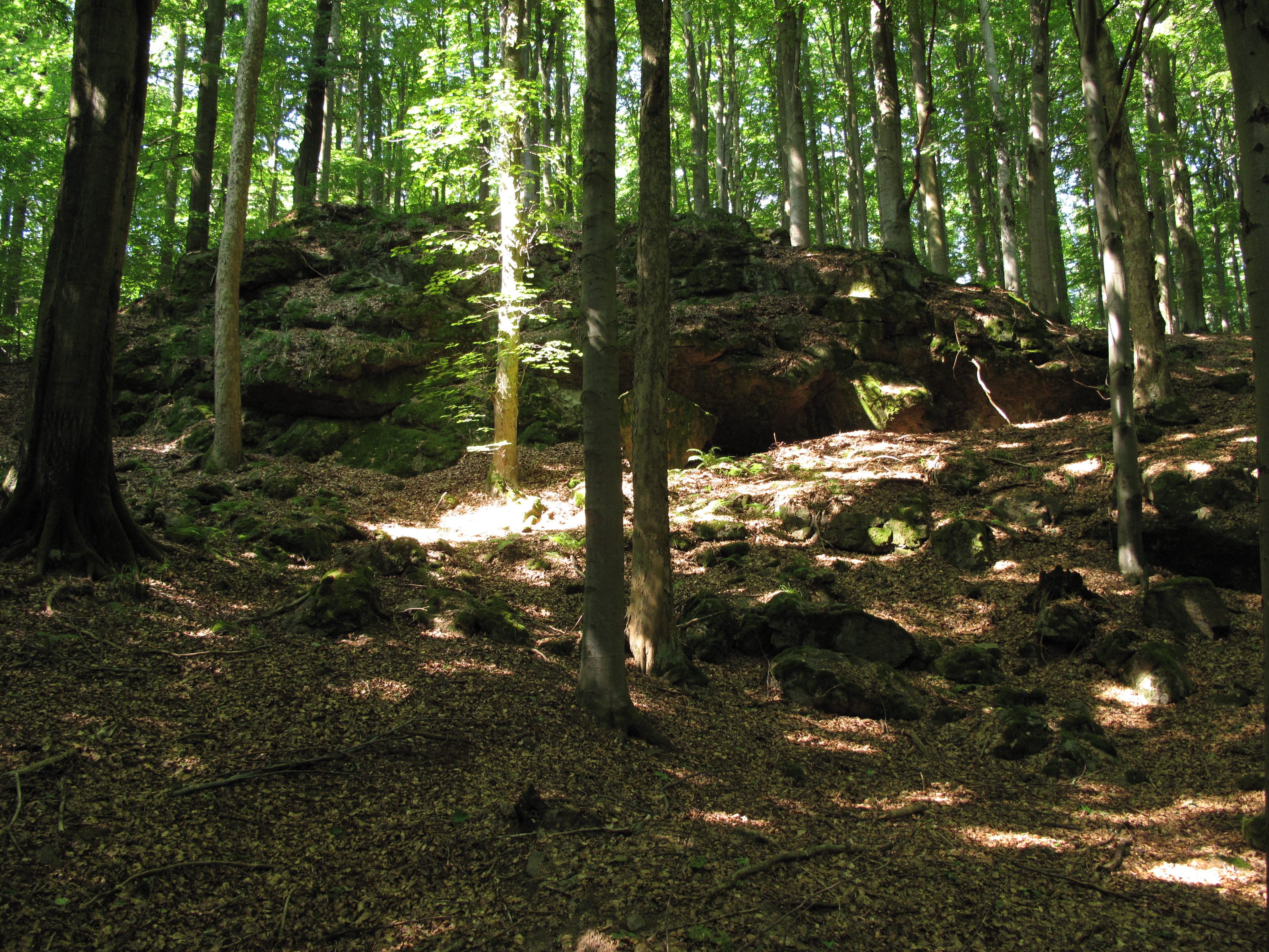 Přírodní památka Vysoký kámen u Smrčné. Okres Jihlava, Česká republika.